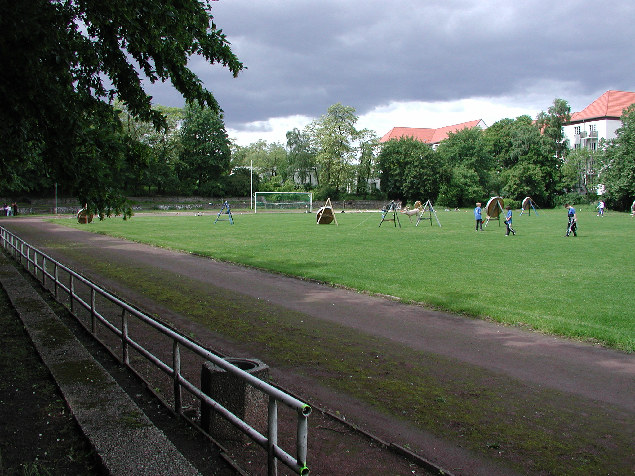 Sportstadion 1. Mai im Lichtenberger Stadtpark